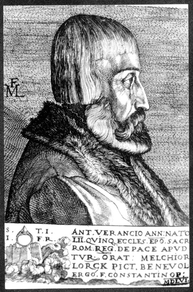 Verancsics Antal (Antun Vrančić) királyi helytartó, római katolikus főpap, pécsi megyés püspök diplomata, történetíró